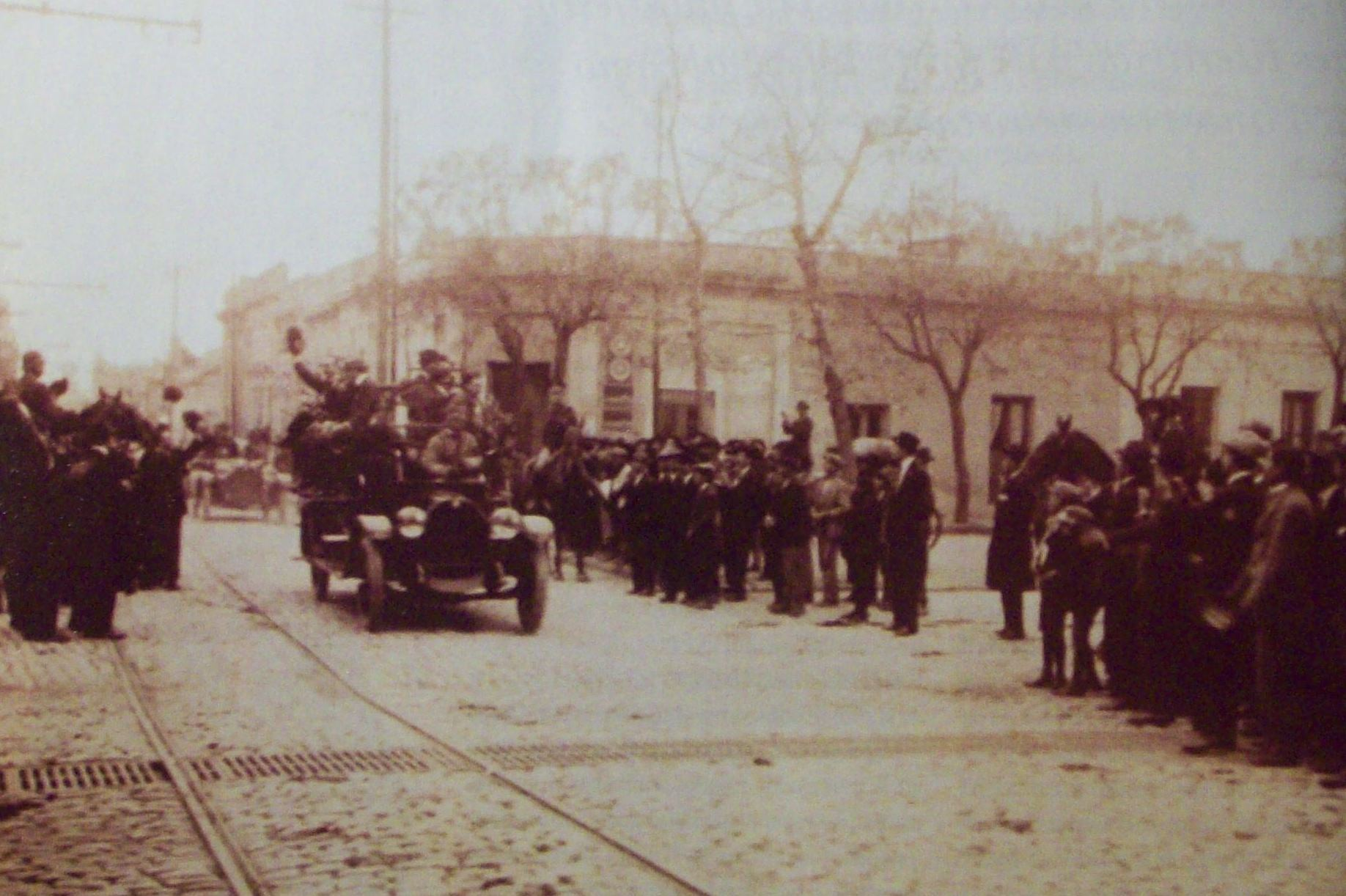 La represión no pudo con el movimiento universitario. Estudiantes trasladados por la policía, Córdoba, 1918.